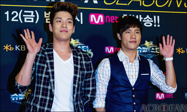 옴므. 슈퍼스타K 3 하이라이트 시사회 레드카펫 행사장에서